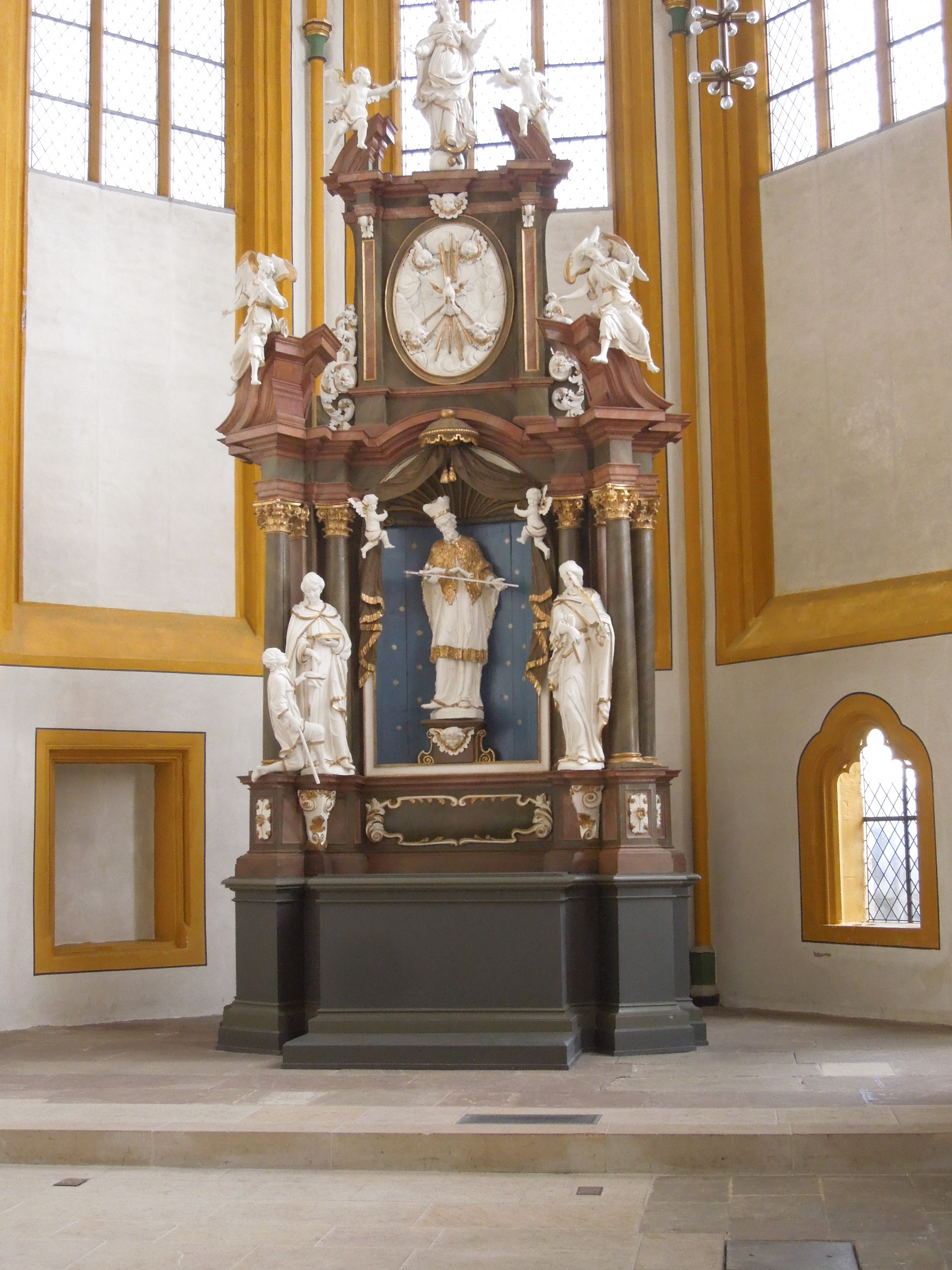 Fritzlar: Hochaltar in der ev. Stadtkirche